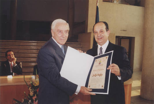 Entrega de reconocimiento a Miguel Otero, por su labor como docente en la Facultad de Derecho de la Universidad de Chile.